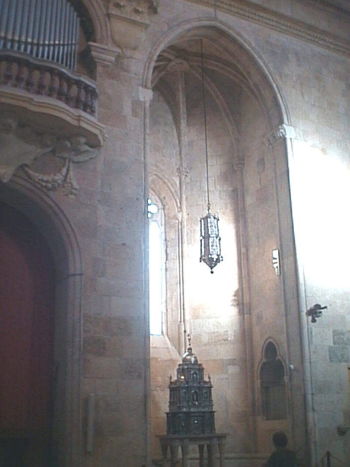 Cappella della Sacra Spina (XIV secolo) Cattedrale di Cagliari